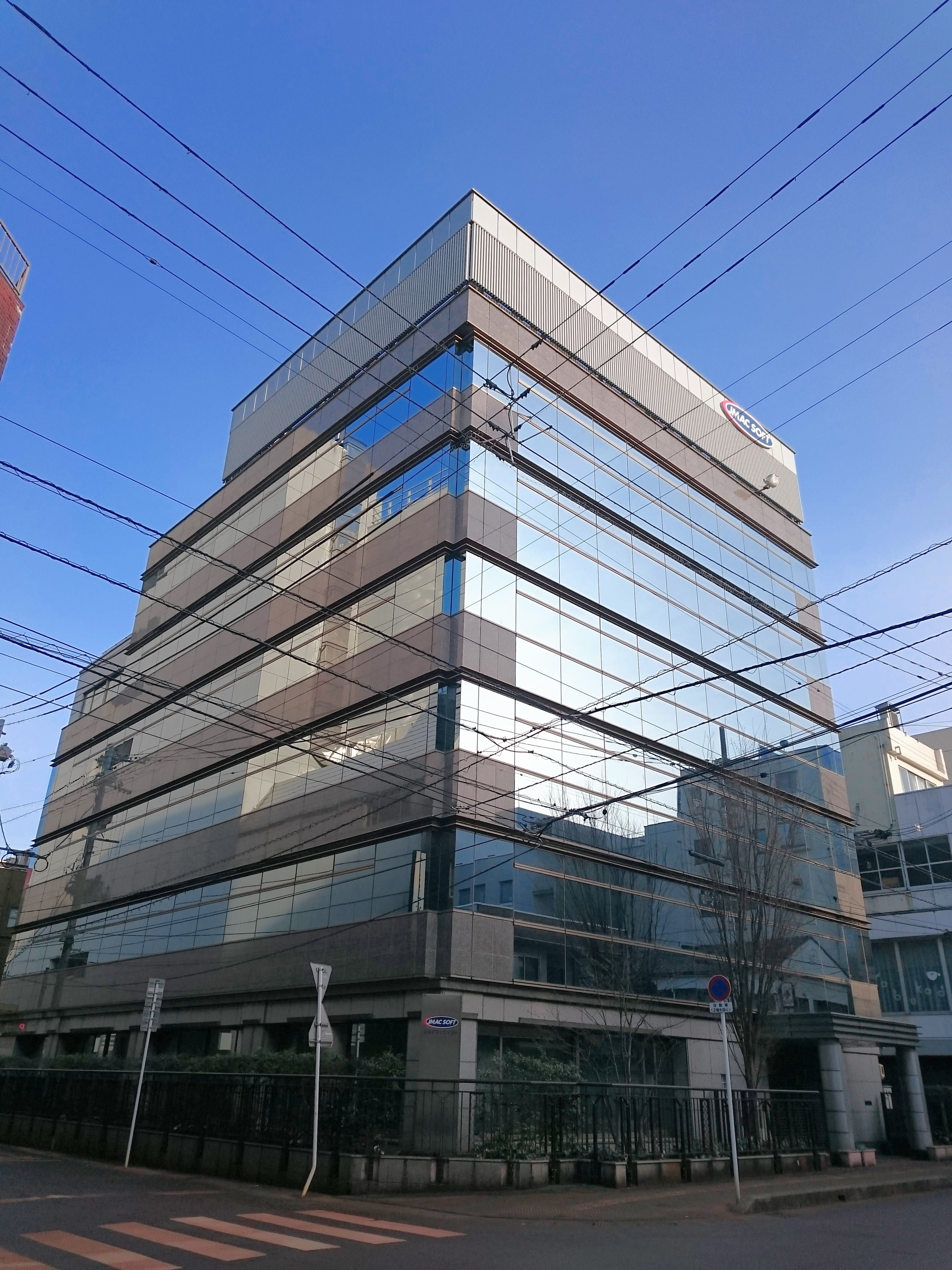 ジェイマックソフトの長岡ビル外観